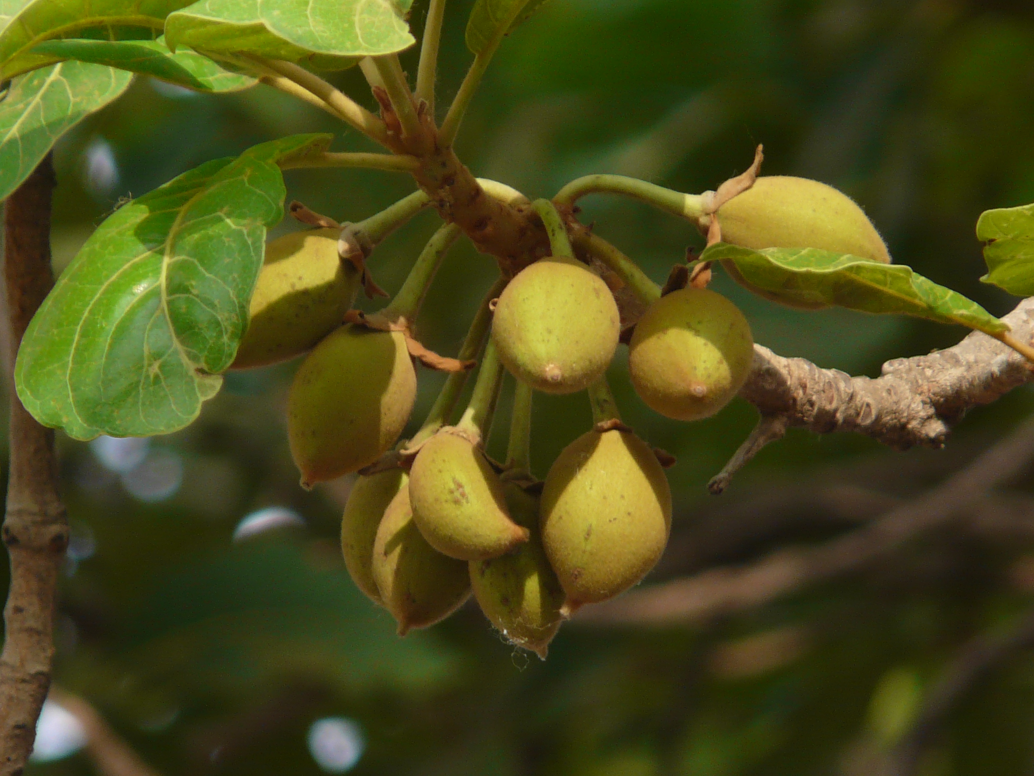 Sapotaceae (sapota family) » Madhuca longifolia var. latifolia MAH-dhuk-ah -- from Sankrit name of the plant, madhuka lon-jee-FOH-lee-uh -- meaning, long leaves lat-ee-FOH-lee-uh or lat-ih-FOH-lee-uh -- meaning, wide leaves commonly known as: honey tree, Indian Butter Tree, mahua • Assamese: মহুবা mahua • Bengali: মহুয়া mahuya • Gujarati: મહુડો mahudo • Hindi: गिलौंदा gilaunda, गुलू gulu, गुड़ gur, महुआ mahua, वानप्रस्थ vanprasth • Kannada: ಇಪ್ಪೆ ippe • Kashmiri: महोरा mahora, महवा मोवा mahwa-mova • Konkani: मोहवा mohwa • Malayalam: ഇലിപ്പ ilippa • Marathi: म्होंव mhomva, मोह or मोहा moha • Nepalese: मौवा mauwa, महुवा mahuwa • Pali: मधुकम madhukam • Prakrit: महुअं mahuam, महुओ mahuo • Sanskrit: मधूक madhuca, मधूकम् madhucam, मोह moha, वानप्रस्थः vānaprasthh • Tamil: காட்டிருப்பை kattiruppai, இலுப்பை illupei • Telugu: ఇప్ప ippa, మధూకము or మధుకము madhukamu • Urdu: گلوندا gilaunda, gul-chikan, گلو gulu, گڙ gur, مہوا mahua Native to: India References: Flowers of India • NPGS / GRIN • Wikipedia • eFlora • DDSA